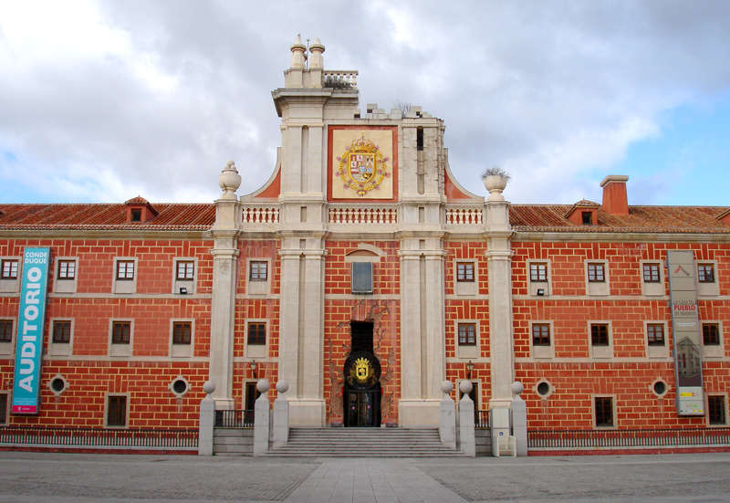 Palazzo interno del Cuartel del Conde Duque